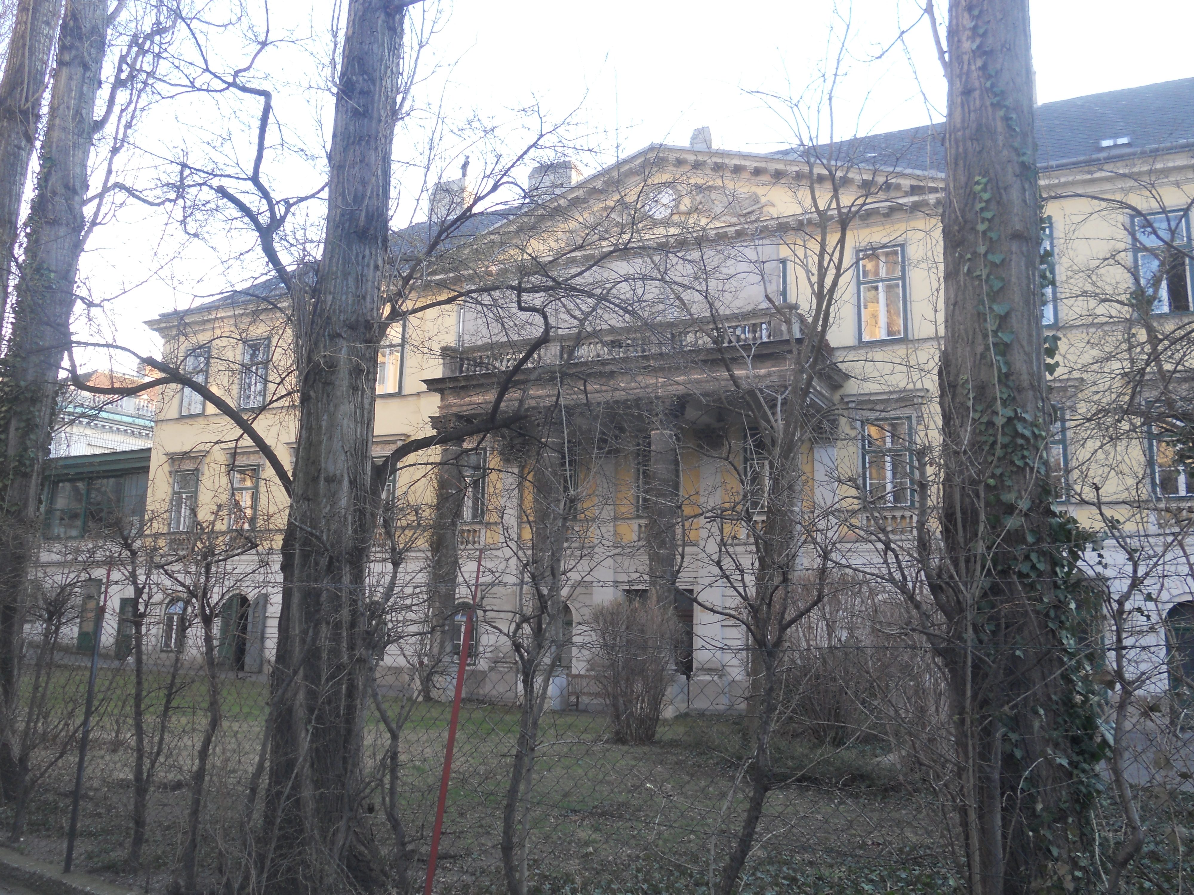 Gartenfassade des Palais Salm in Wien-Landstraße